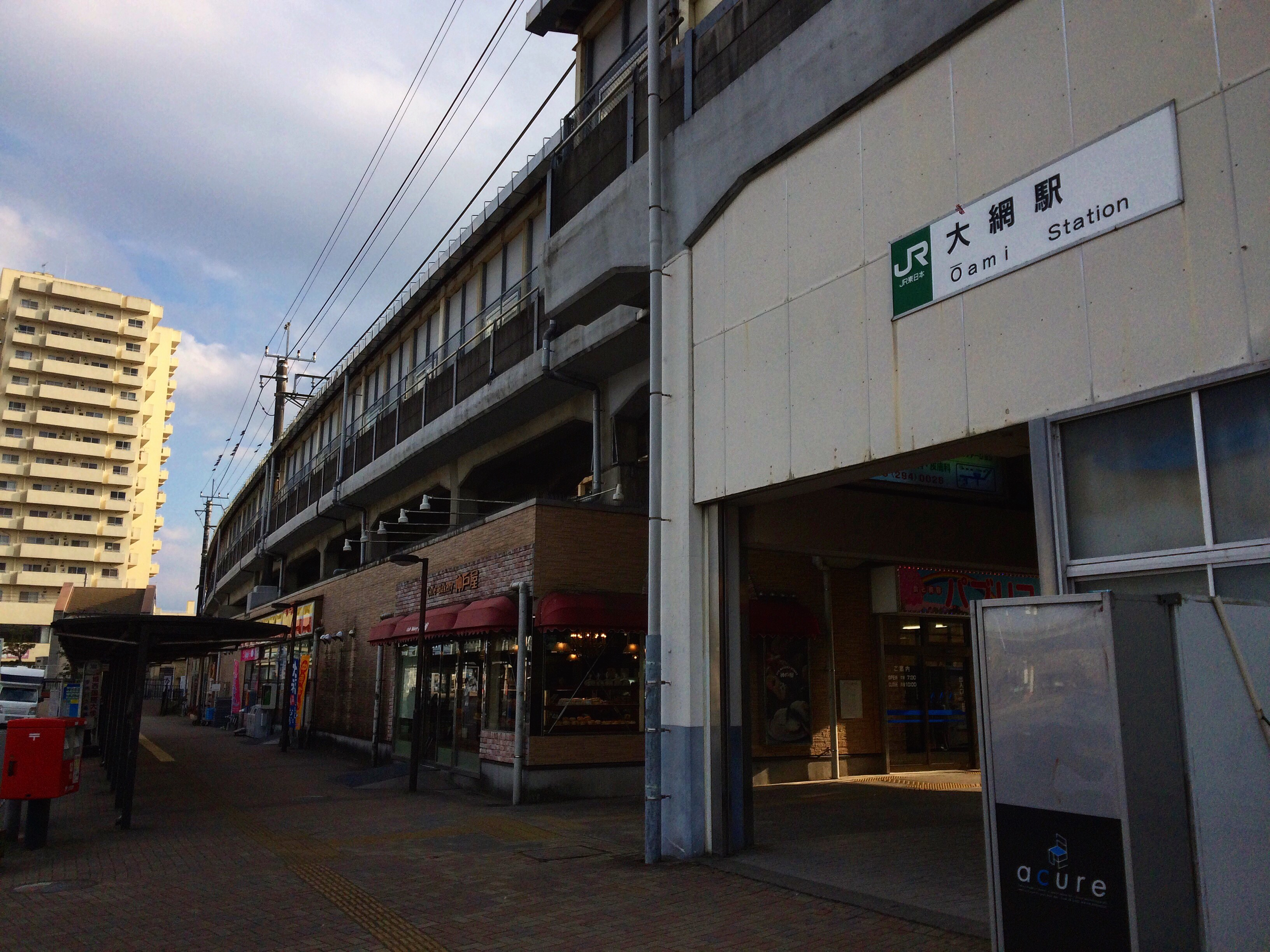 大網駅入口